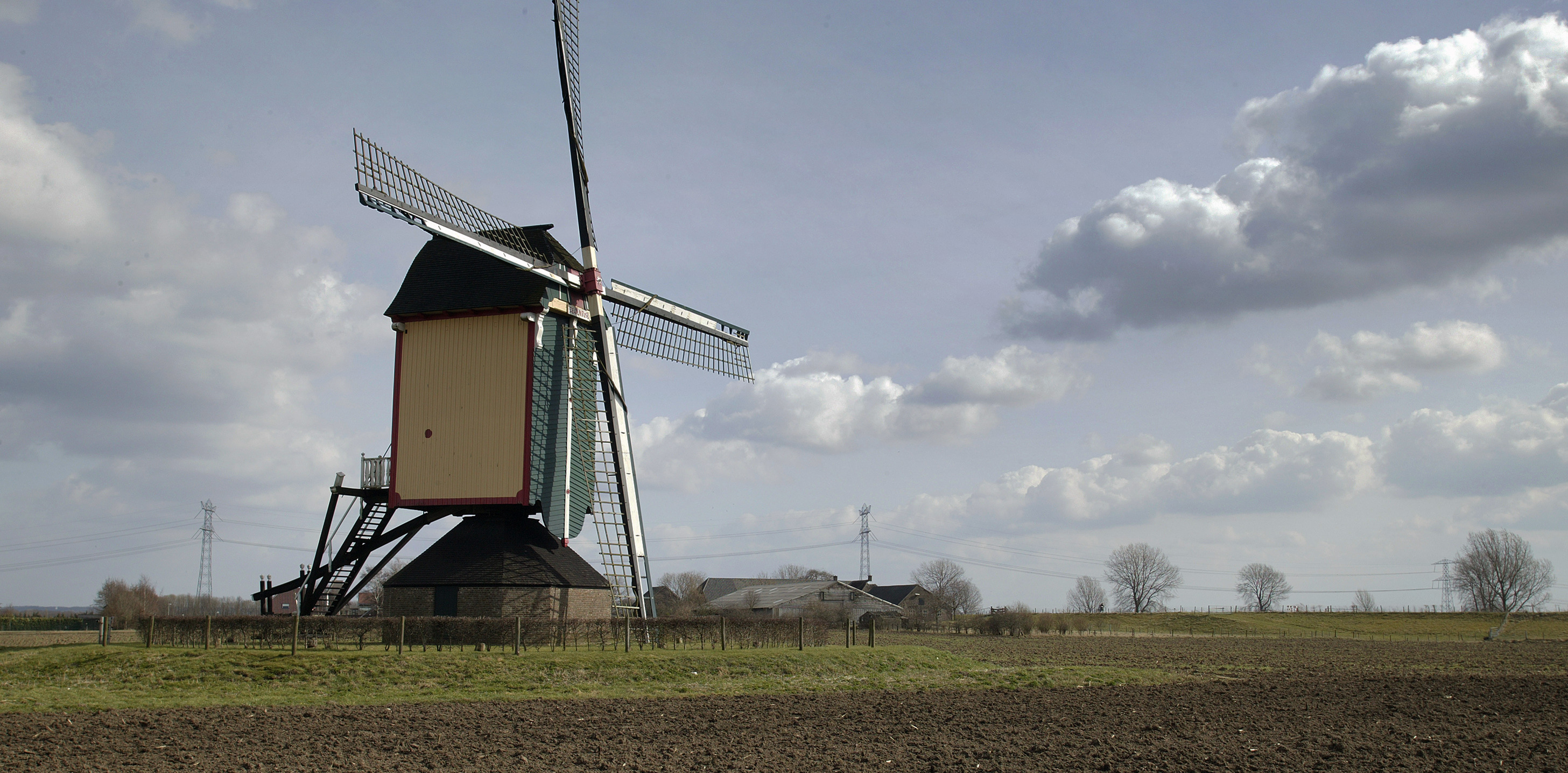 Zeldenrust: Wipmolen bij Overasselt